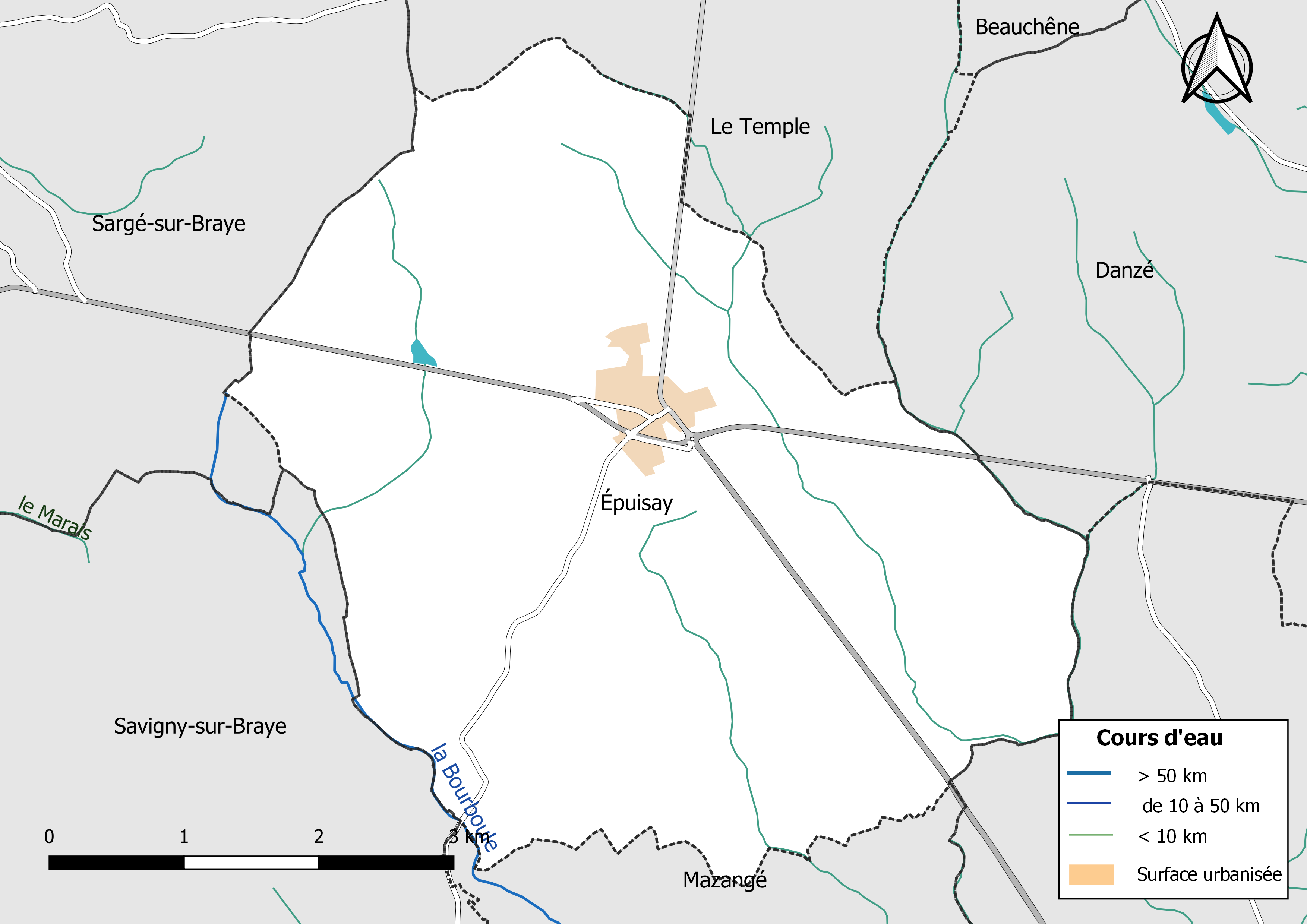 Carte du réseau hydrographique de la commune de Épuisay (Loir-et-Cher, France).